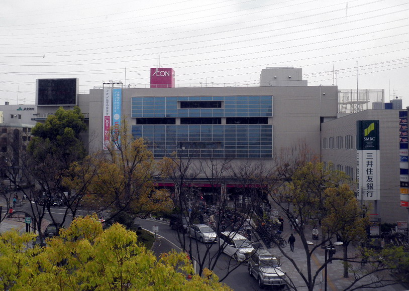 京阪古川橋駅より撮影